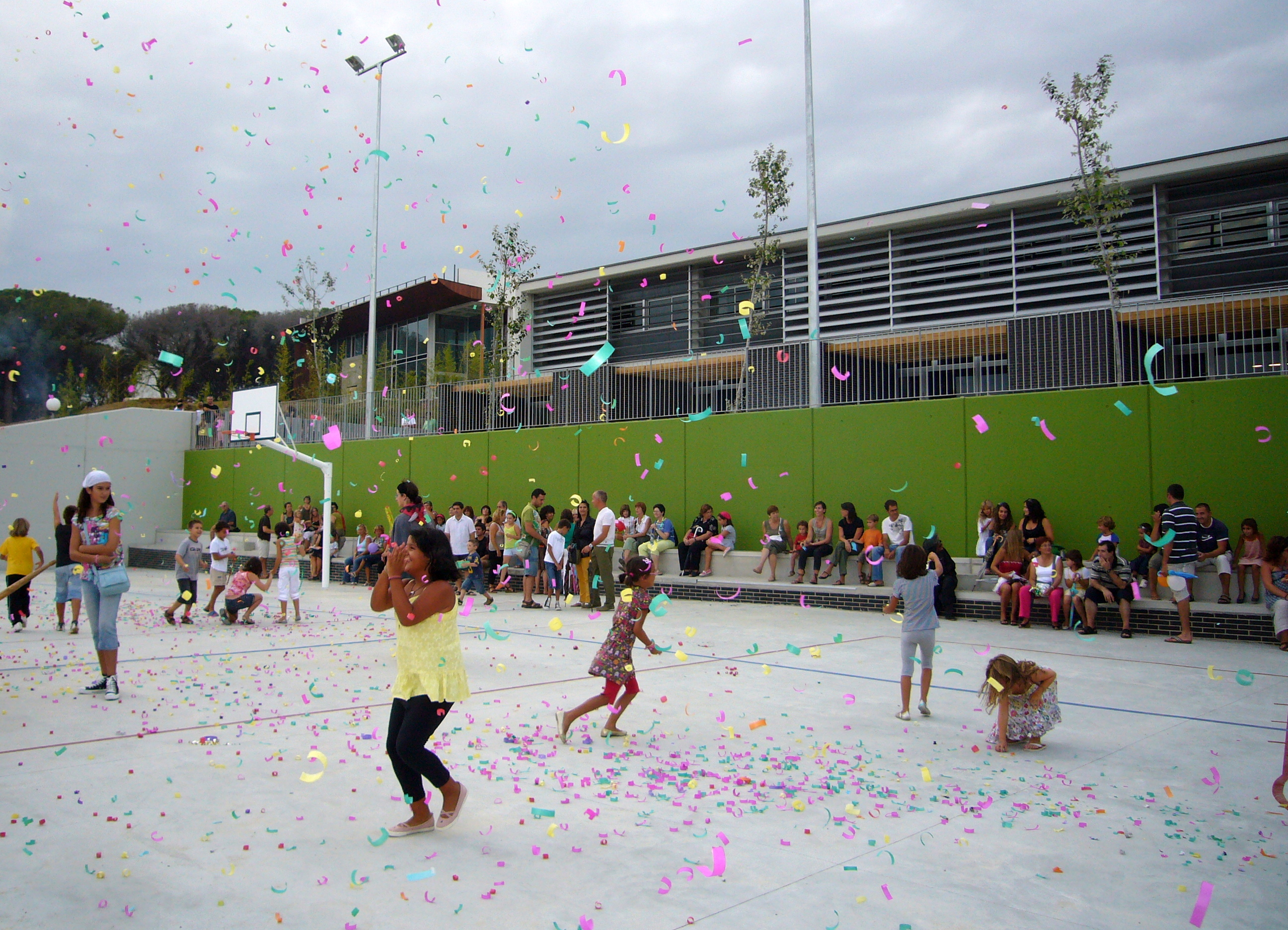 Festa d'inauguració del nou centre de CEIP Turó del Drac de Canet de Mar